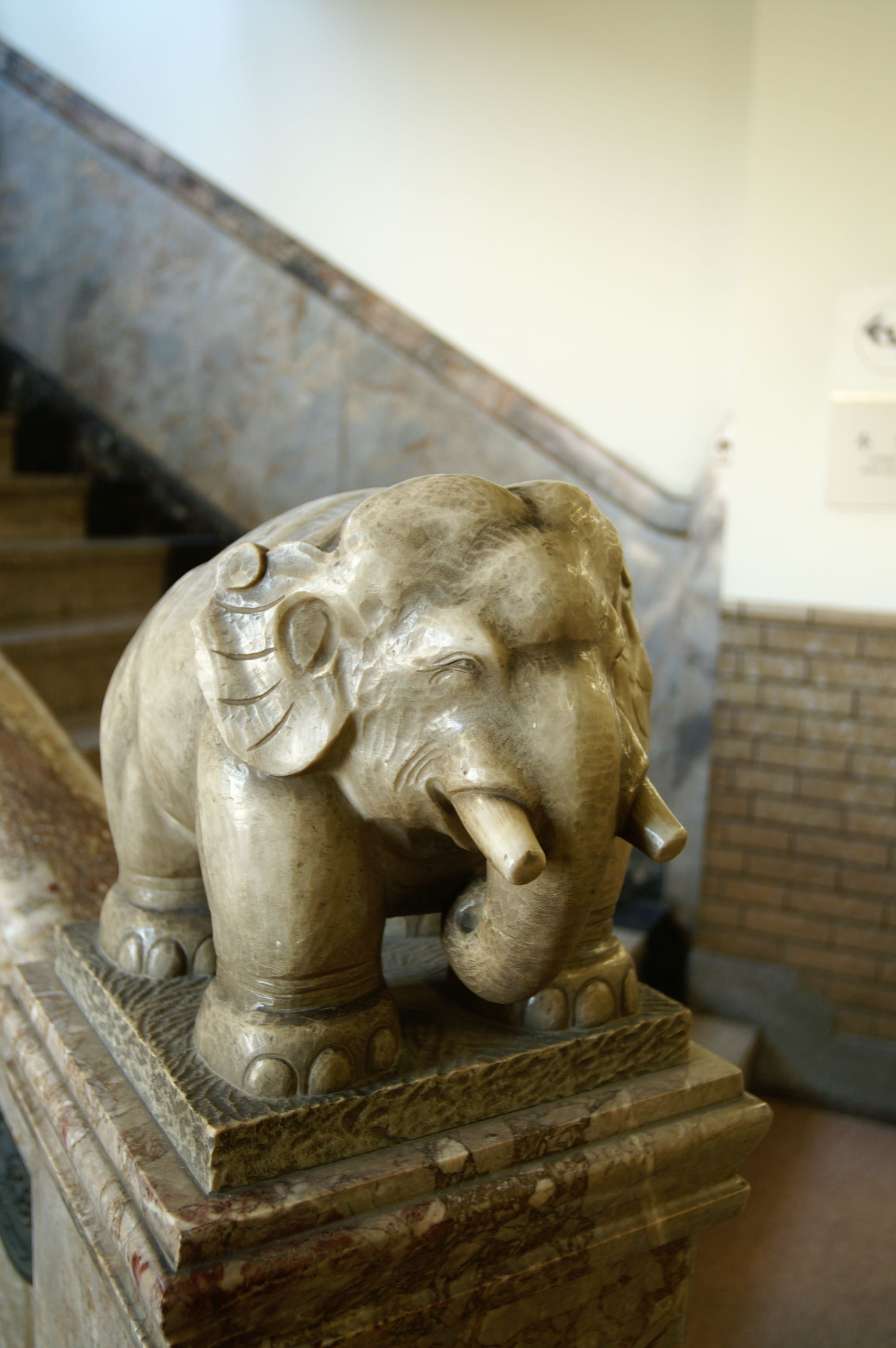 浄土真宗本願寺派の本願寺築地別院(築地本願寺)。 (2007/11/21 Chuo, Tokyo, JAPAN)